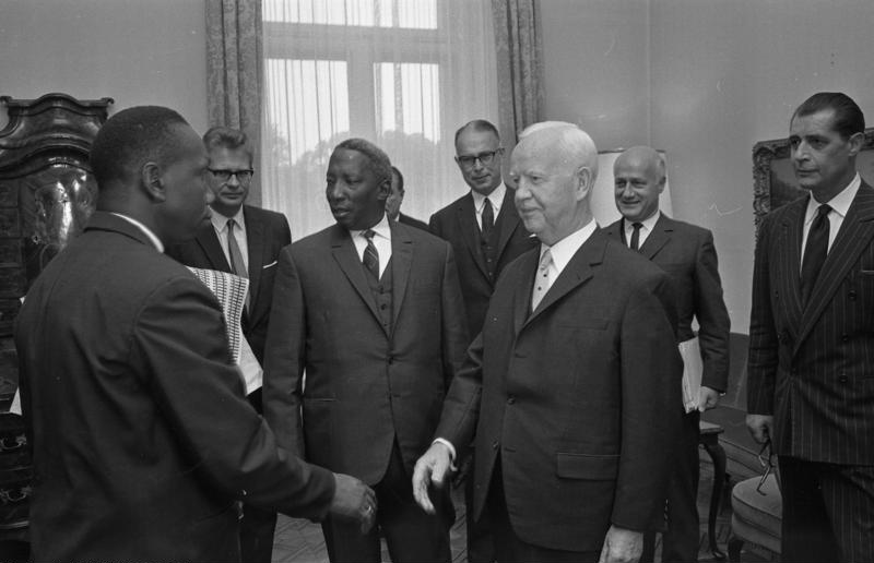 BuPrä Lübke empfängt den Präs. der Nationalversammlung von Mali Alassani Haidara